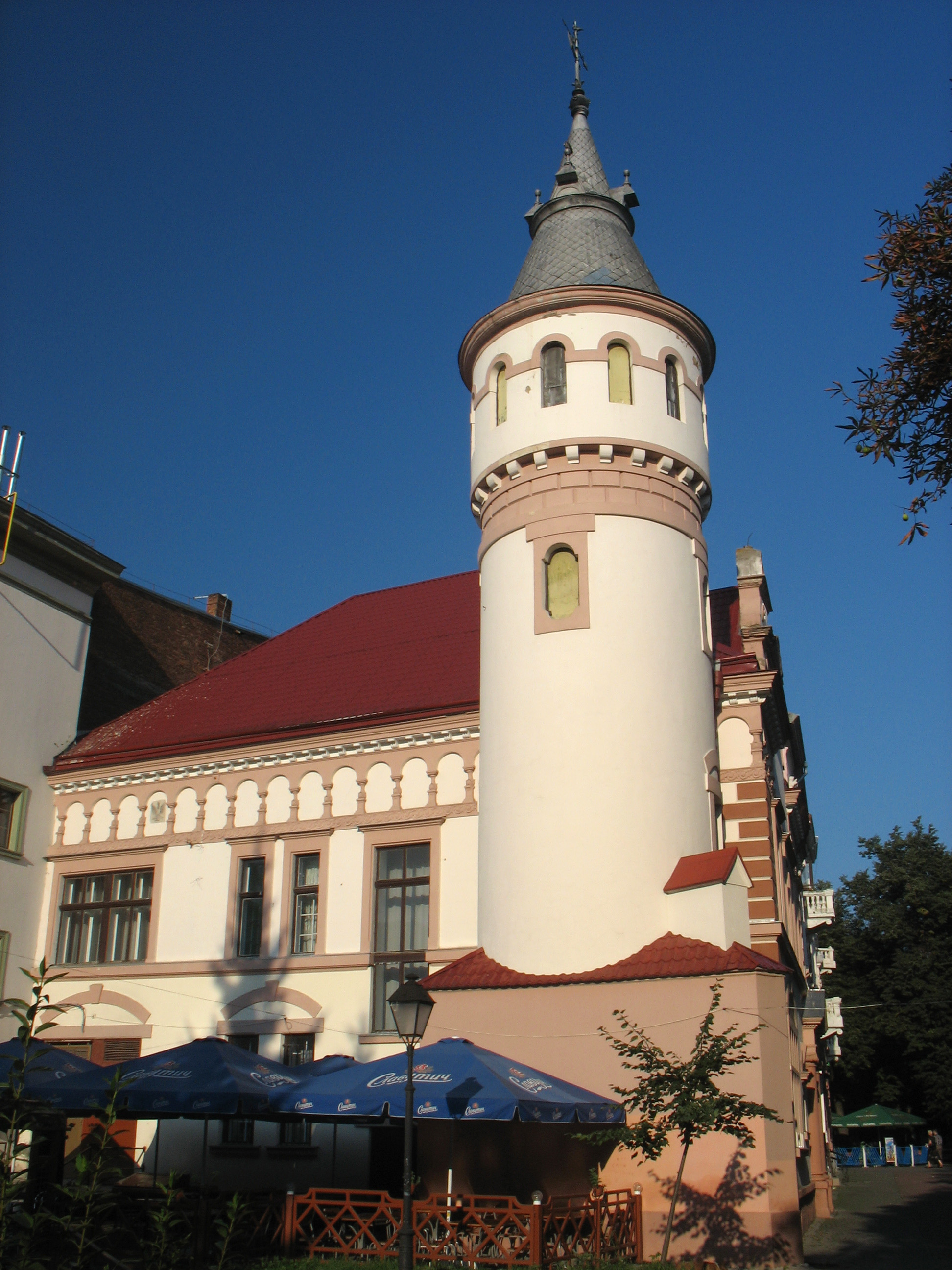 Івано-Франківськ, Міцкевича, 2 "Сокіл"